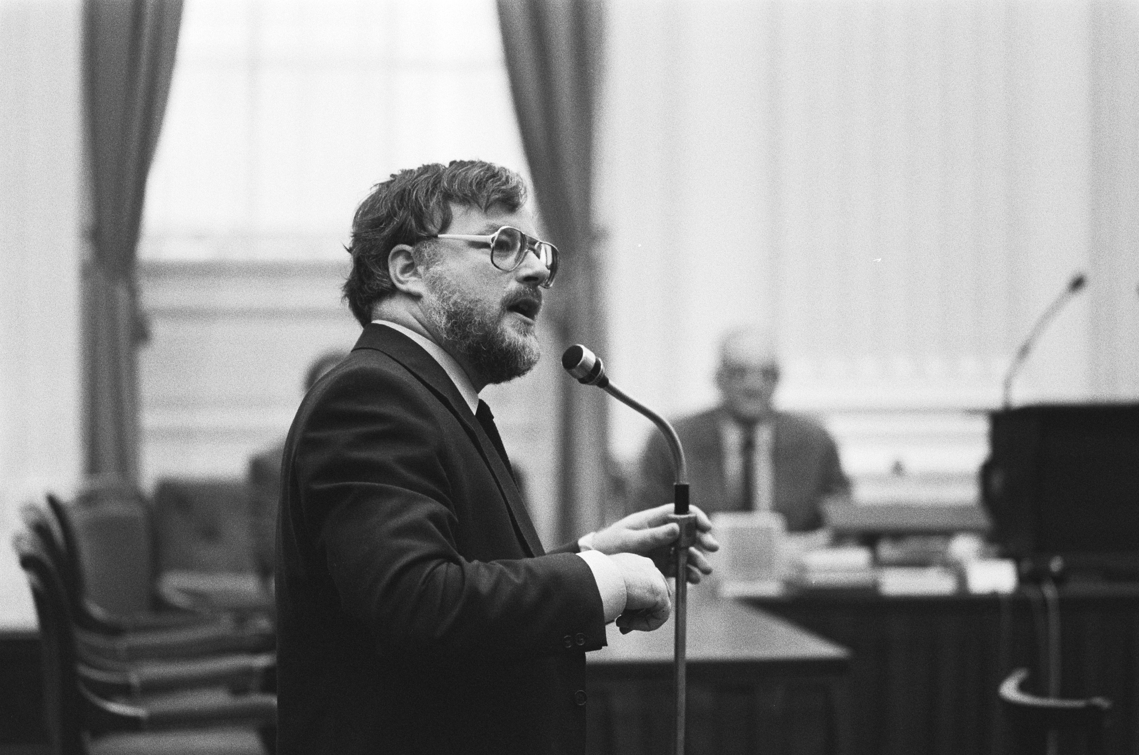 Collectie / Archief : Fotocollectie Anefo Reportage / Serie : Tweede Kamer behandelt Voorjaarsnota1982; antwoord van de regering; Beschrijving : Wöltgens (PvdA) bij de interruptiemicrofoon Datum : 24 juni 1982 Locatie : Den Hag, Zuid-Holland Trefwoorden : parlementaire debatten, parlementariërs, politiek Persoonsnaam : Wöltgens, Thijs Fotograaf : Bogaerts, Rob / Anefo Auteursrechthebbende : Nationaal Archief Materiaalsoort : Negatief (zwart/wit) Nummer archiefinventaris : bekijk toegang 2.24.01.05 Bestanddeelnummer : 932-2234